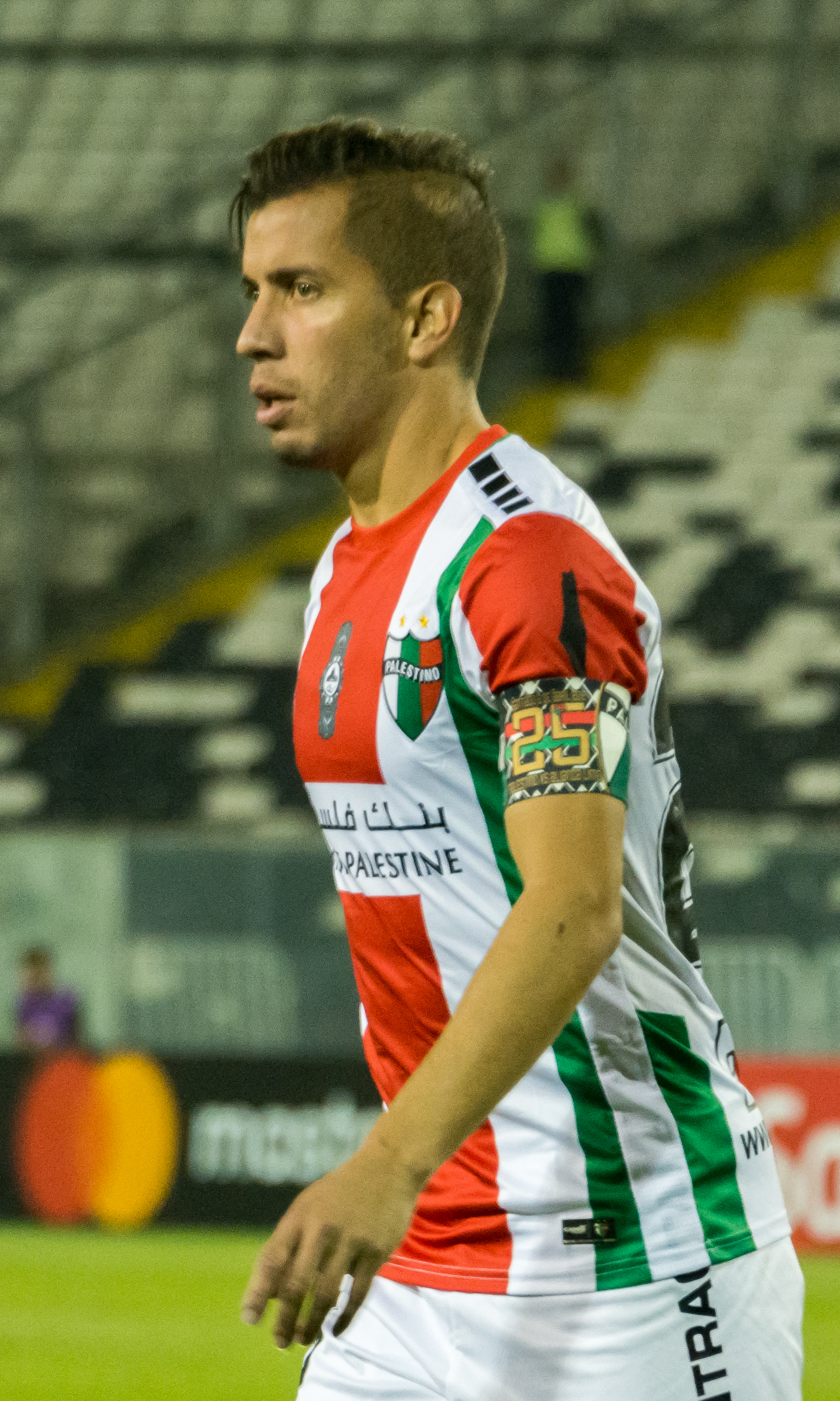 Agustín Farías, Palestino vs Alianza Lima, Estadio Monumental, Macul, Santiago, Chile.